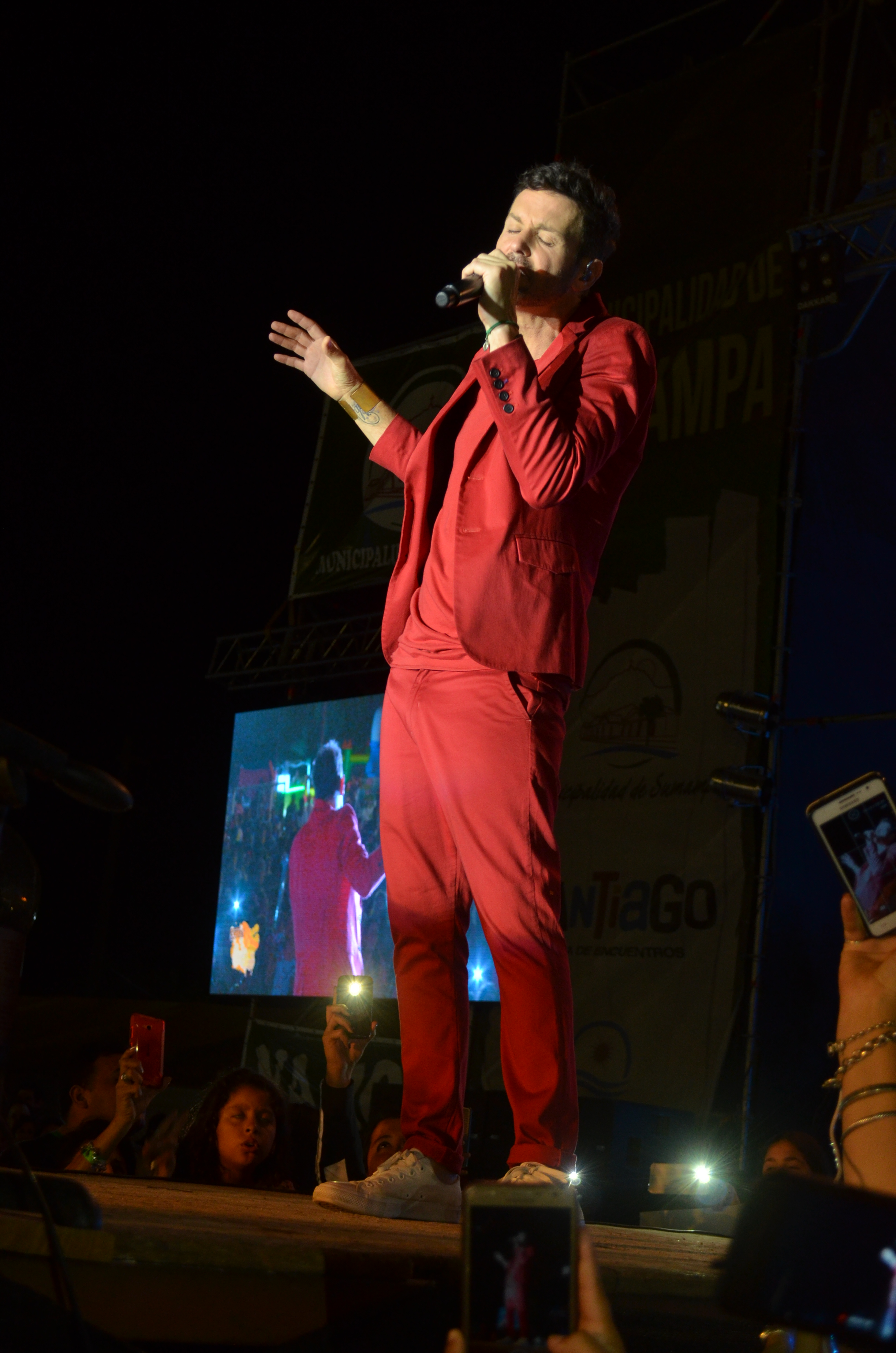 Axel en el Festival de la Cancion Popular Sumampa 2018